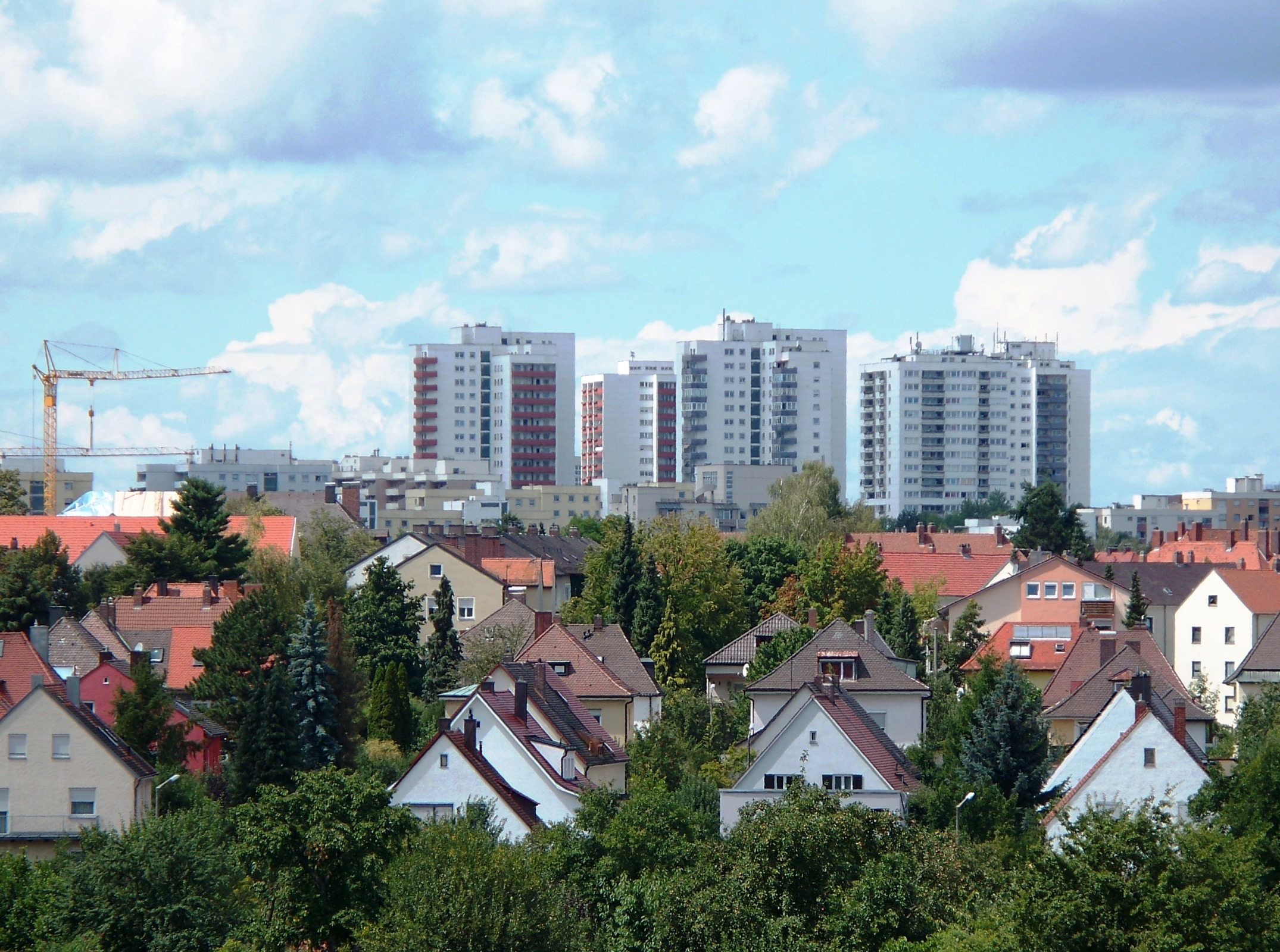 Der Stadtteil Königswiesen in Regensburg im Jahr 2008.